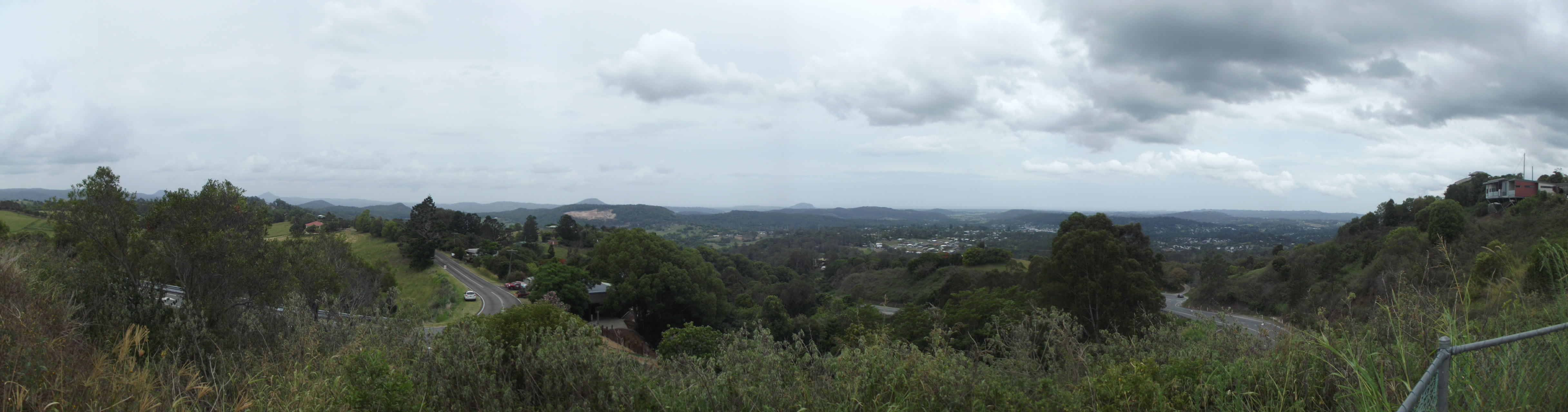 Kureelpa QLD 4560, Australia